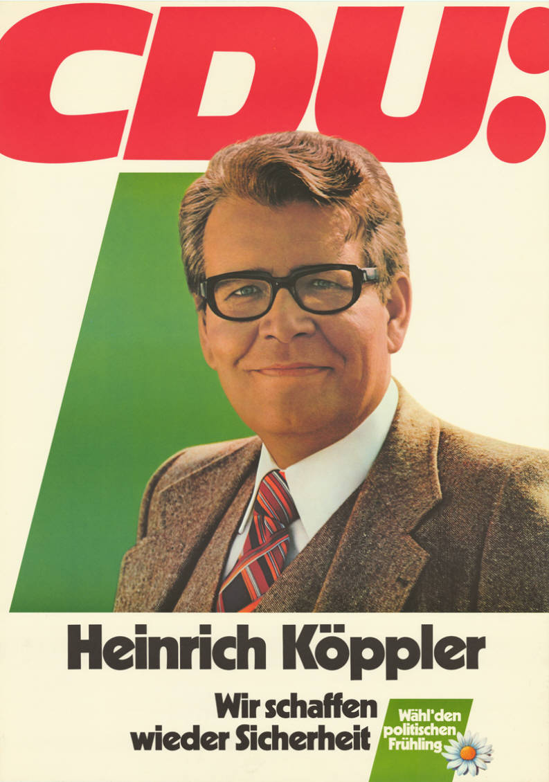 CDU: Heinrich Köppler Wir schaffen wieder Sicherheit Wähl' den politischen Frühling Abbildung: Porträtfoto Plakatart: Kandidaten-/Personenplakat mit Porträt Objekt-Signatur: 10-009 : 701 Bestand: Landtagswahlplakate Nordrhein-Westfalen (10-009) GliederungBestand10-18: Landtagswahlplakate Nordrhein-Westfalen (10-009) » CDU Lizenz: KAS/ACDP 10-009 : 701 CC-BY-SA 3.0 DE